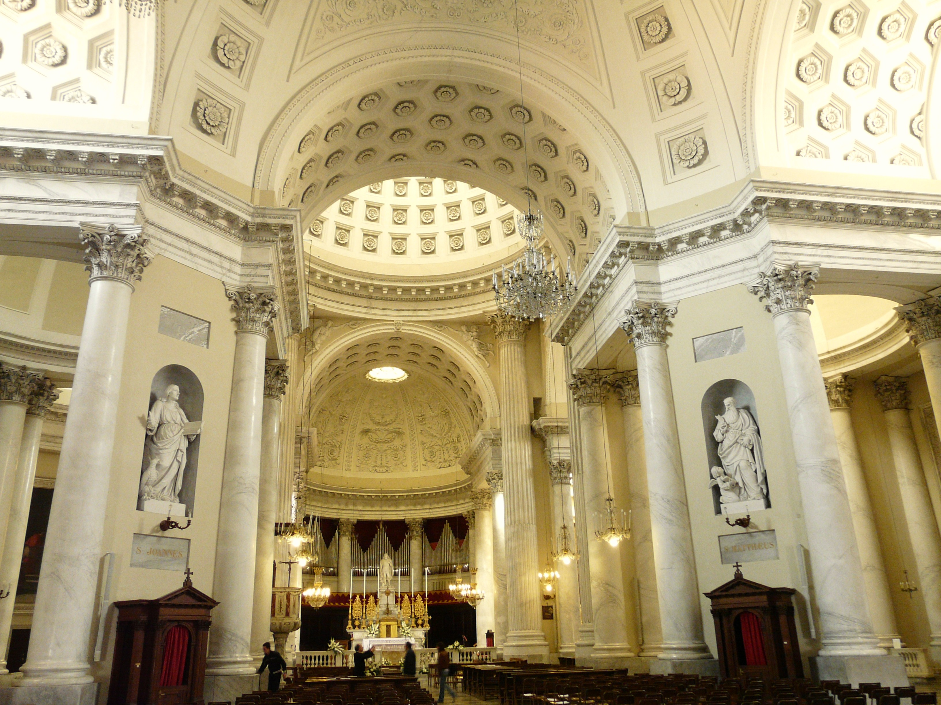 Basilica di San Maurizio, Porto Maurizio, Comune di Imperia, Liguria, Italia